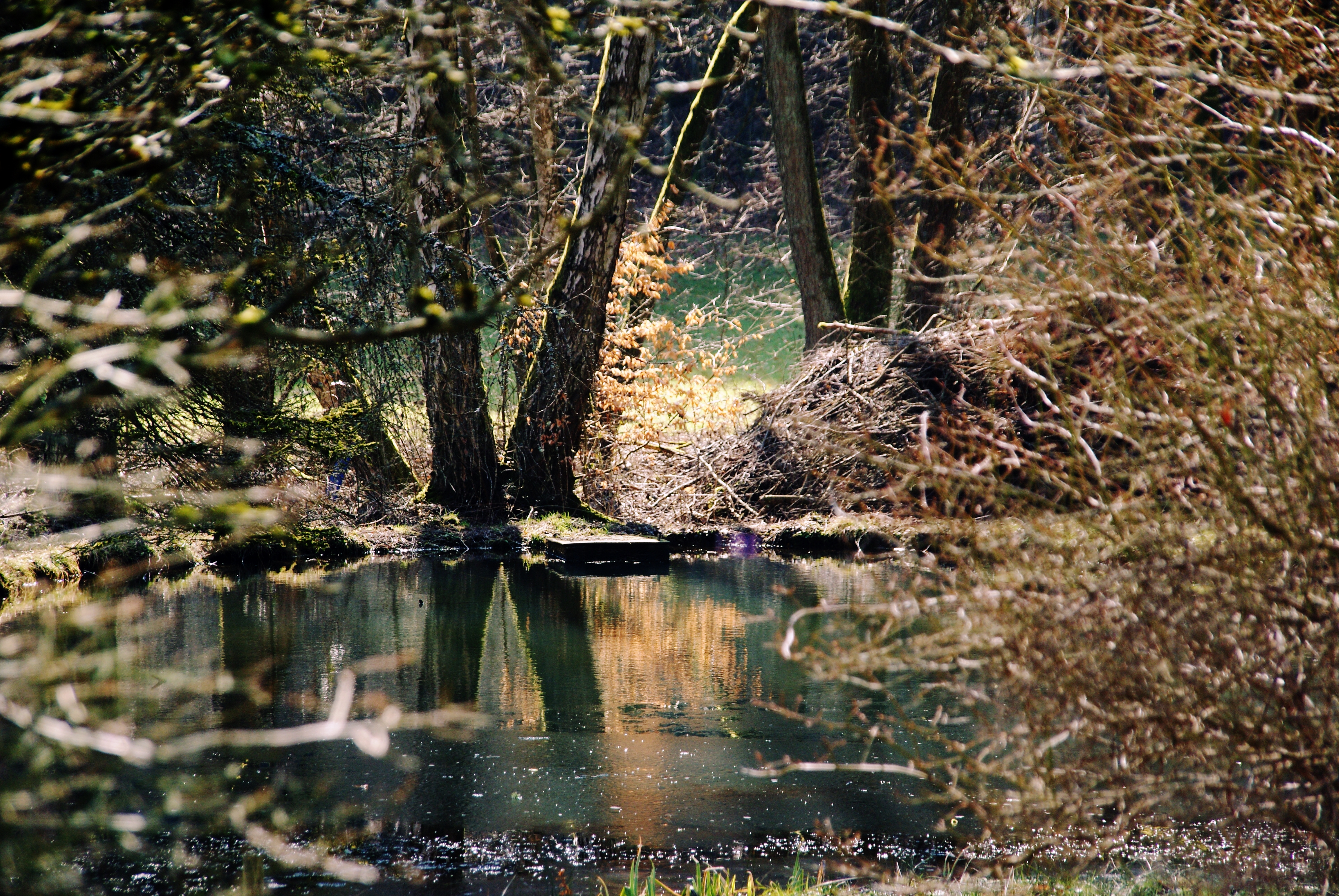 (NSG:HE-1439029)_Theißtal von Niedernhausen